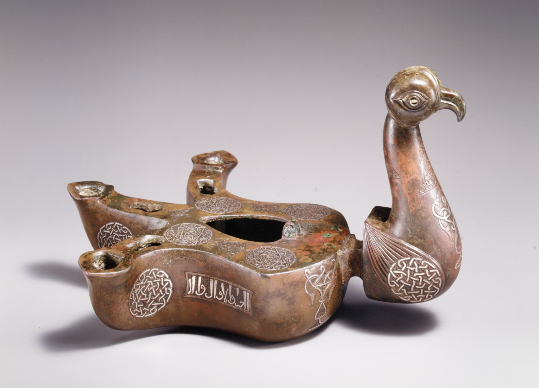 Oil lamp; Metal